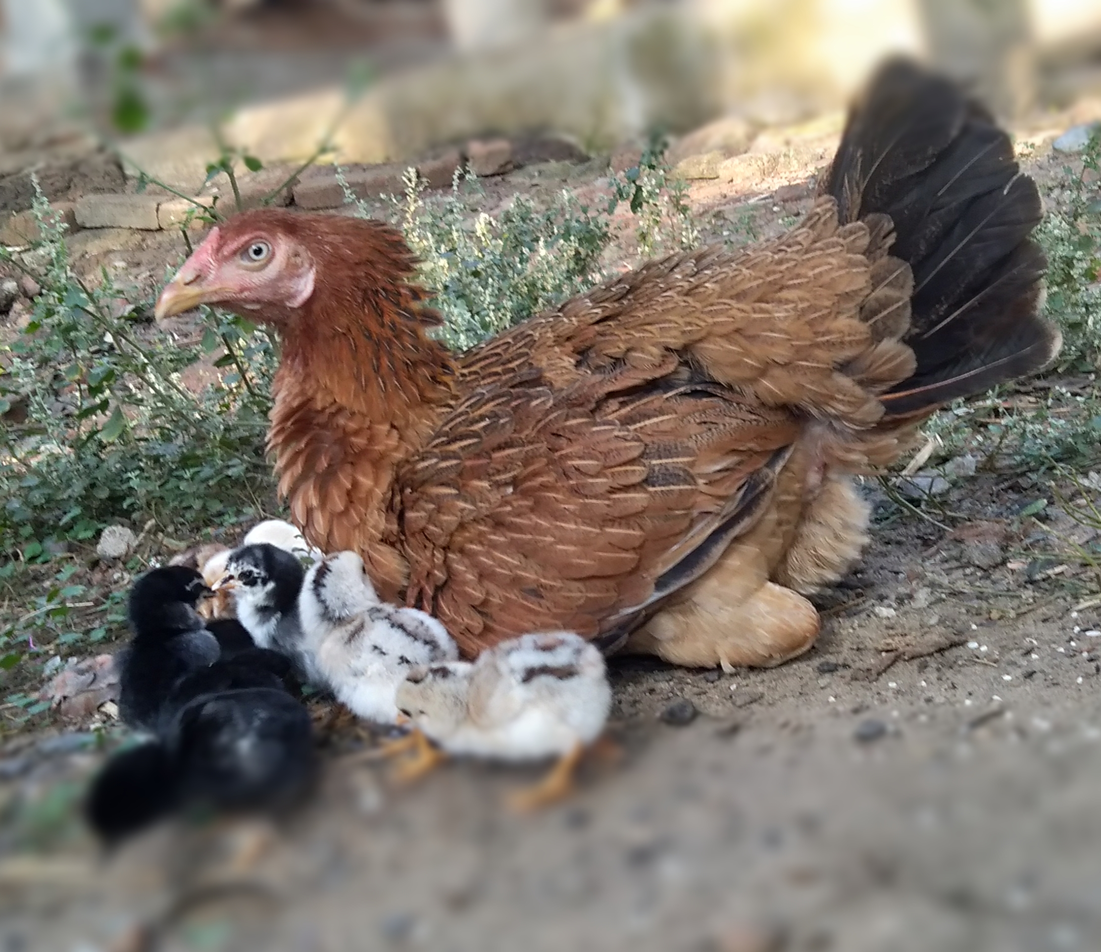 కోడి పెట్ట దాని పిల్లలు